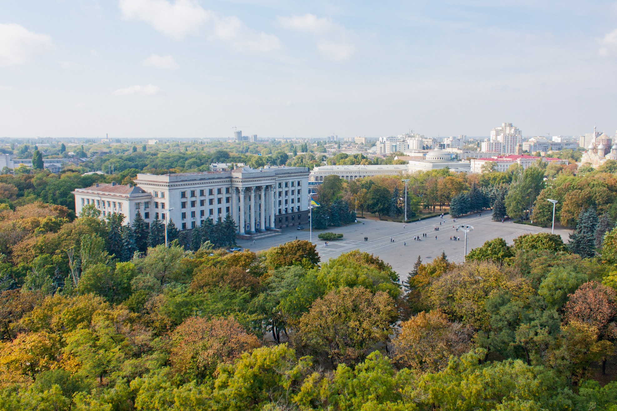 Адміністративна споруда, Одеса, Куликове поле, 1